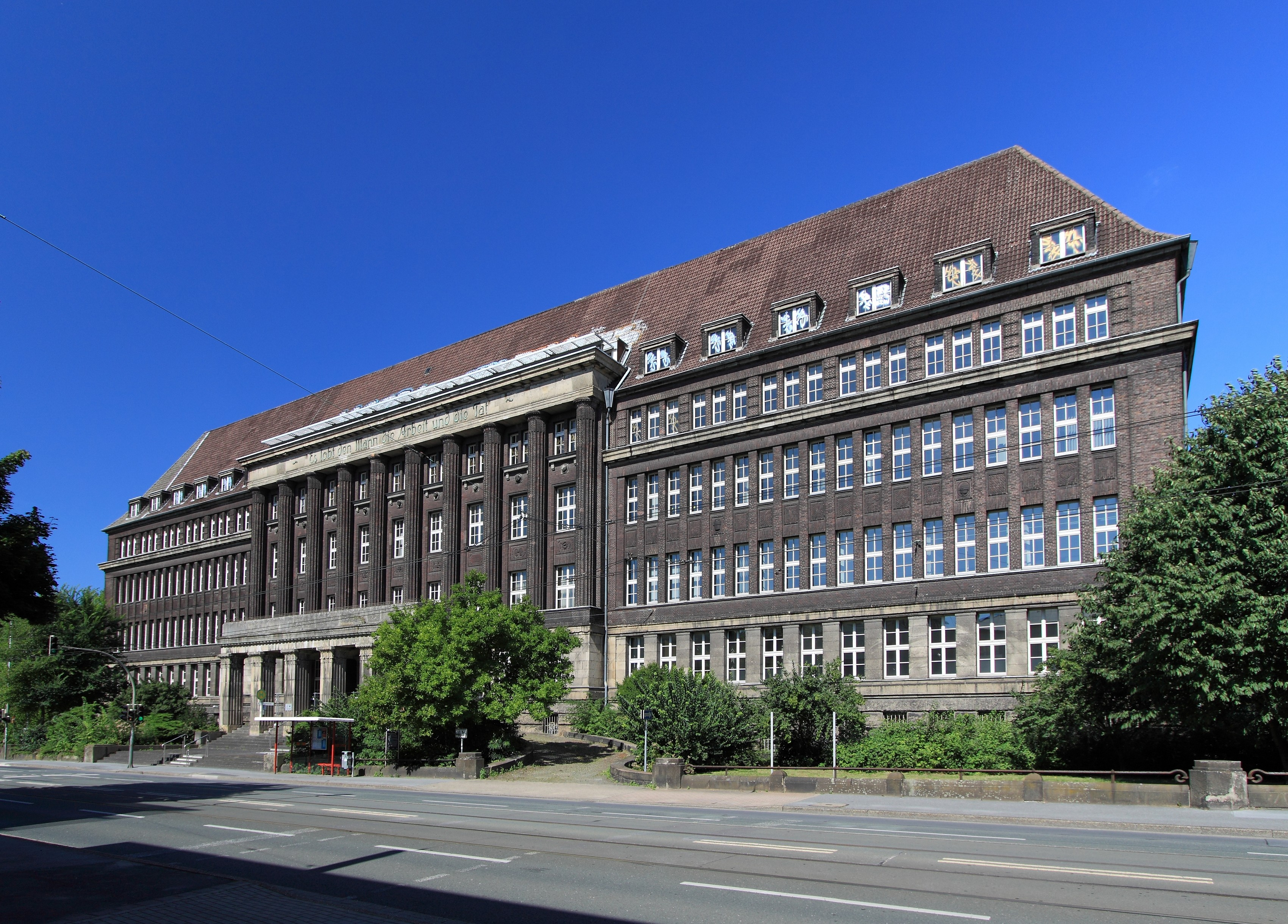 Ehemalige Hoesch-Zentrale, Dortmund